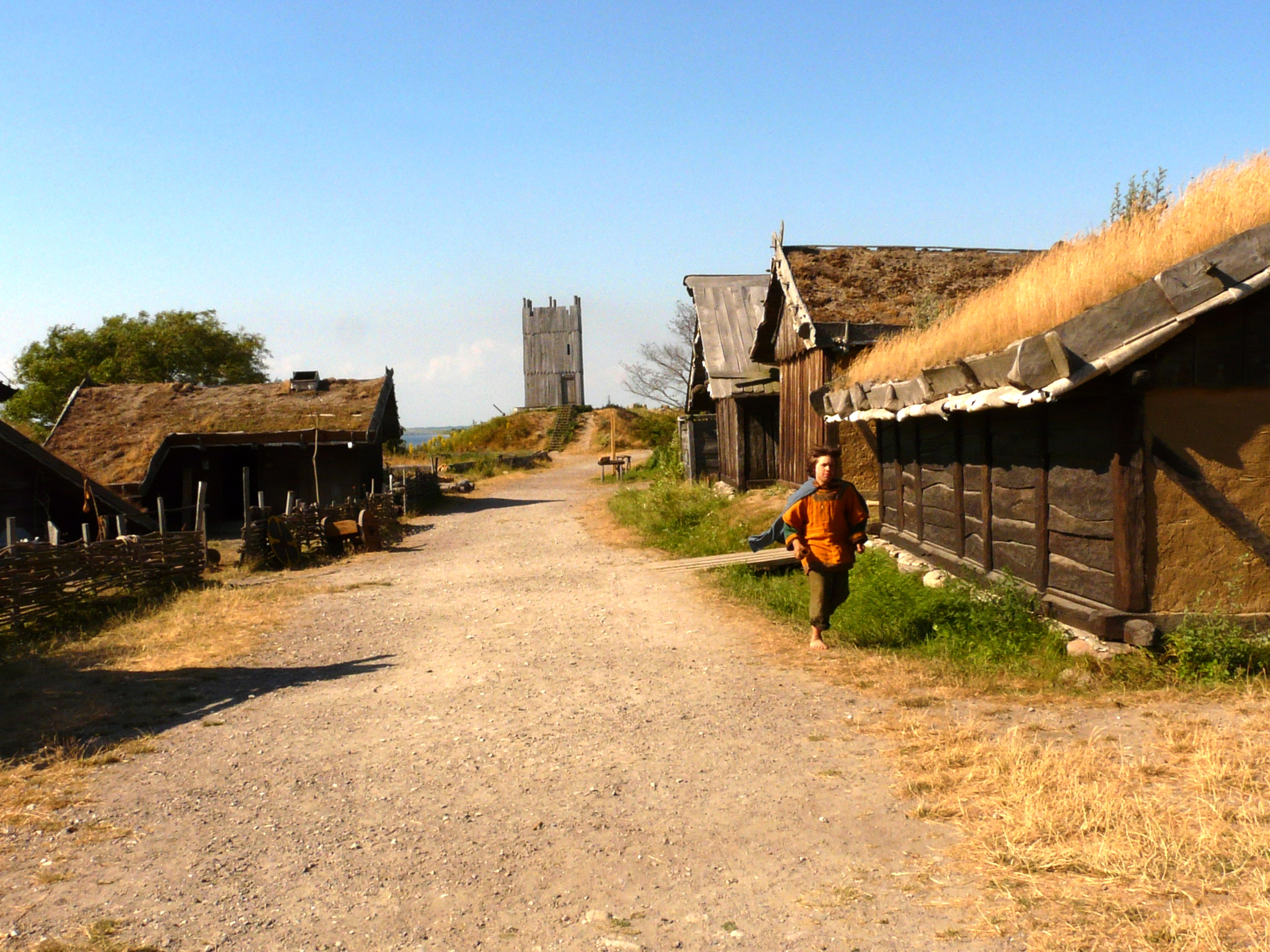 Die "Hauptstraße" im Freilichtmuseum "Vikingareservat Foteviken" (Höllviken, Schweden)